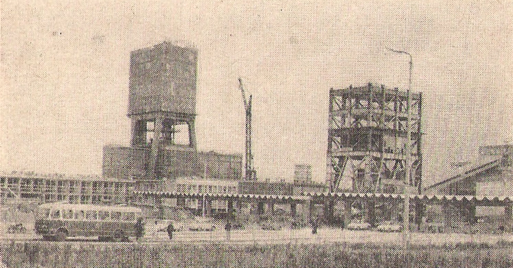 Autobus na budowie Zakładów Górniczych Lubin